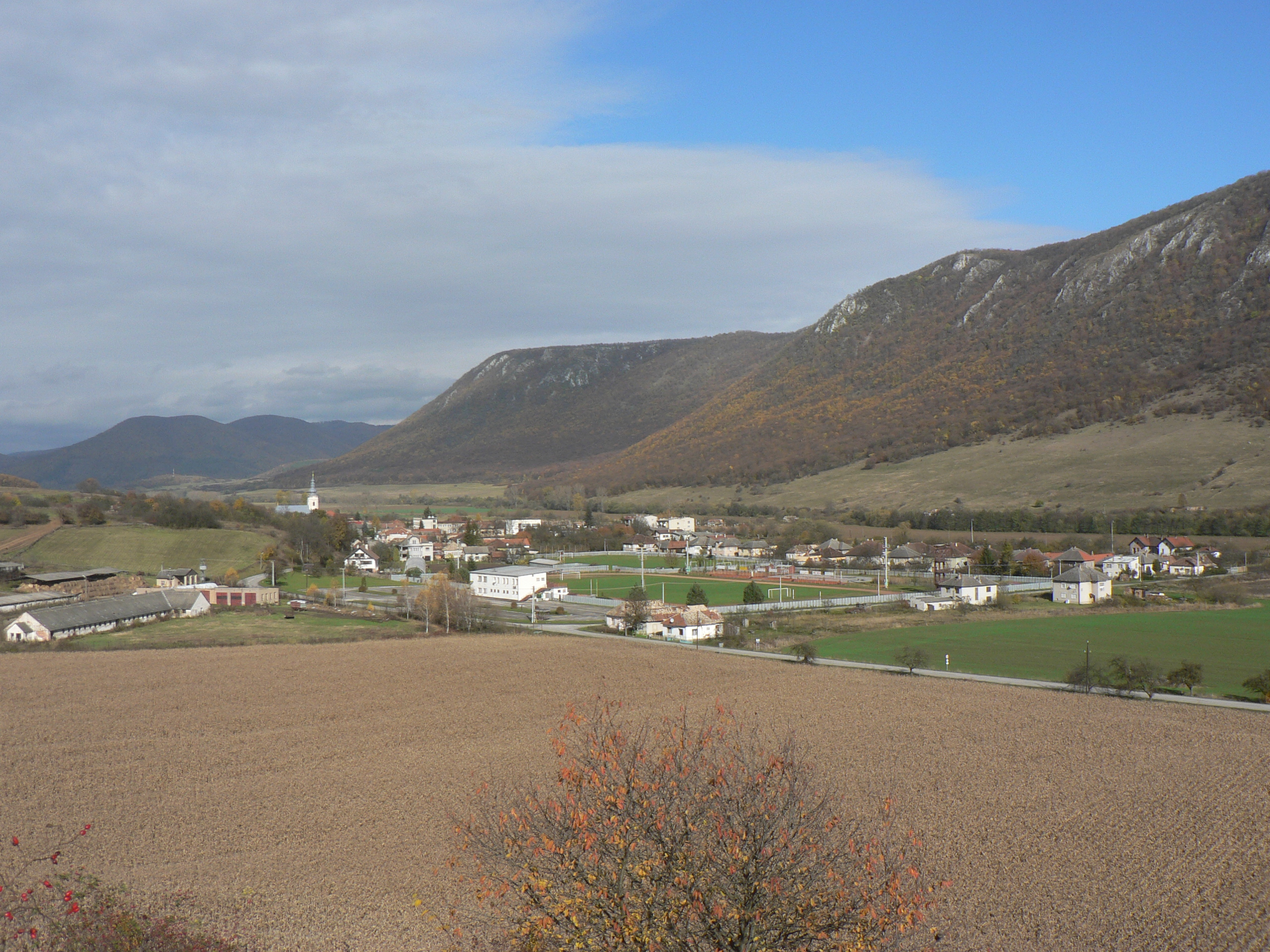 Kuntapolcai látkép (Szlovákia)